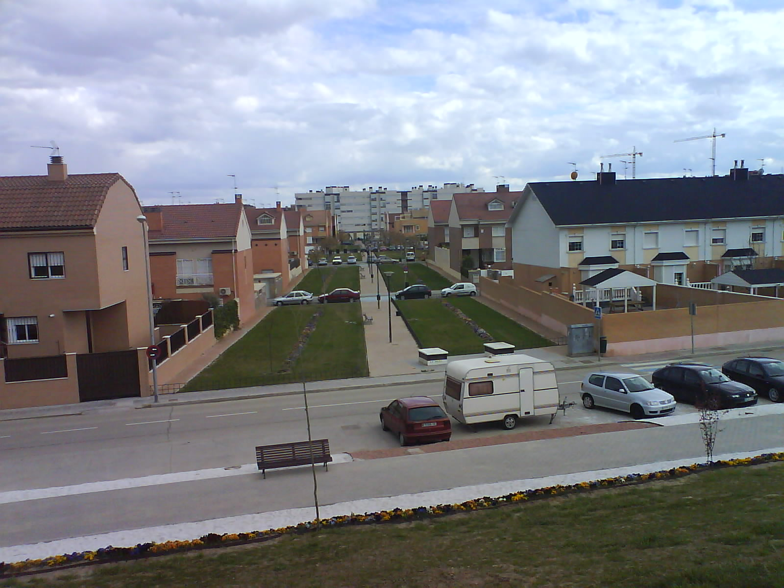 Parque de Interbloque en La Laguna Parla